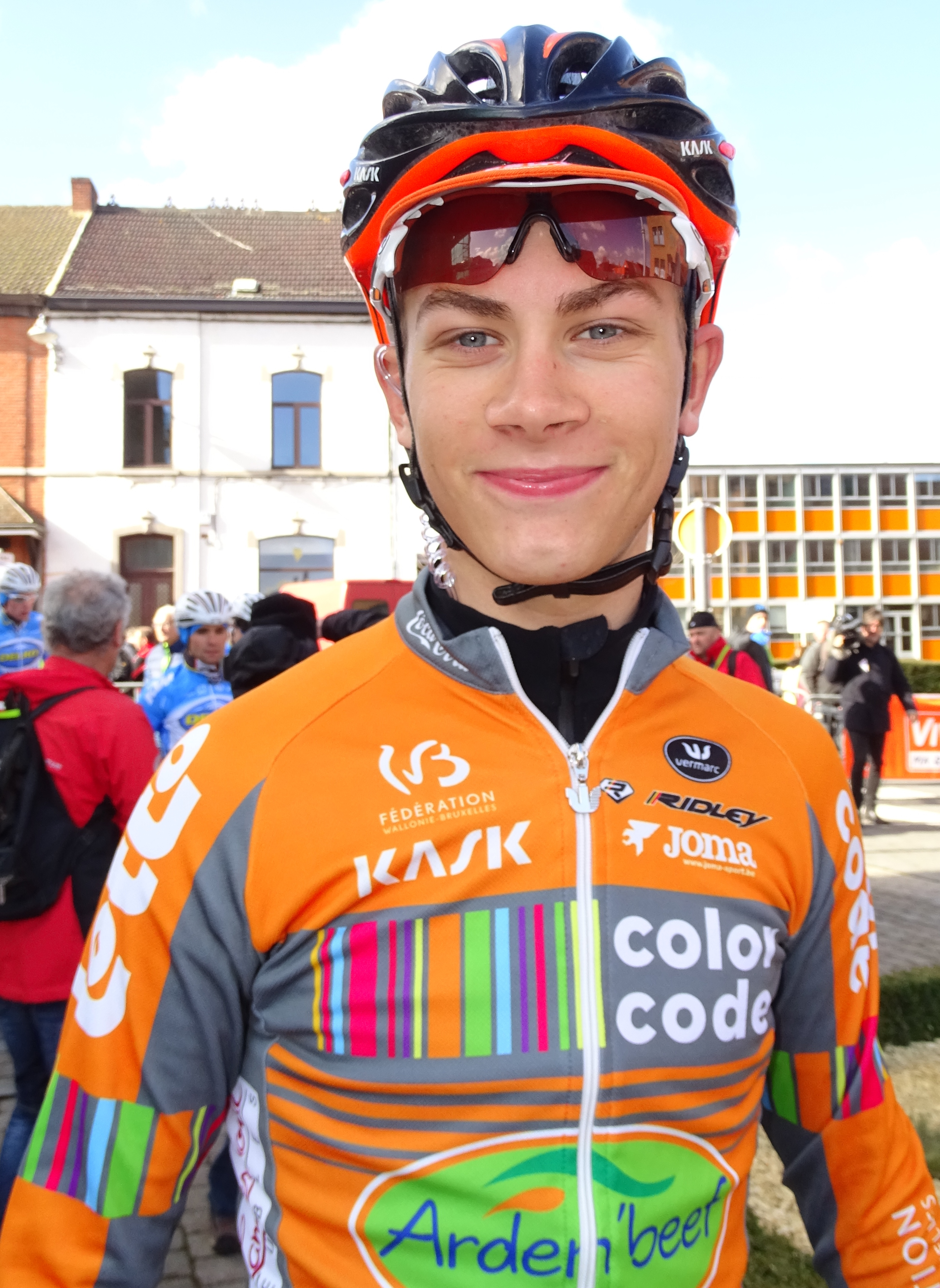 Reportage réalisé le mercredi 2 mars à l'occasion du départ du Samyn des Dames 2016 et du Samyn 2016 à Quaregnon, Belgique.